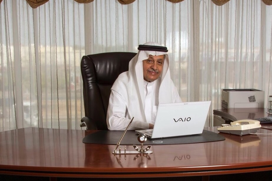 الدكتور علي بمكتبه